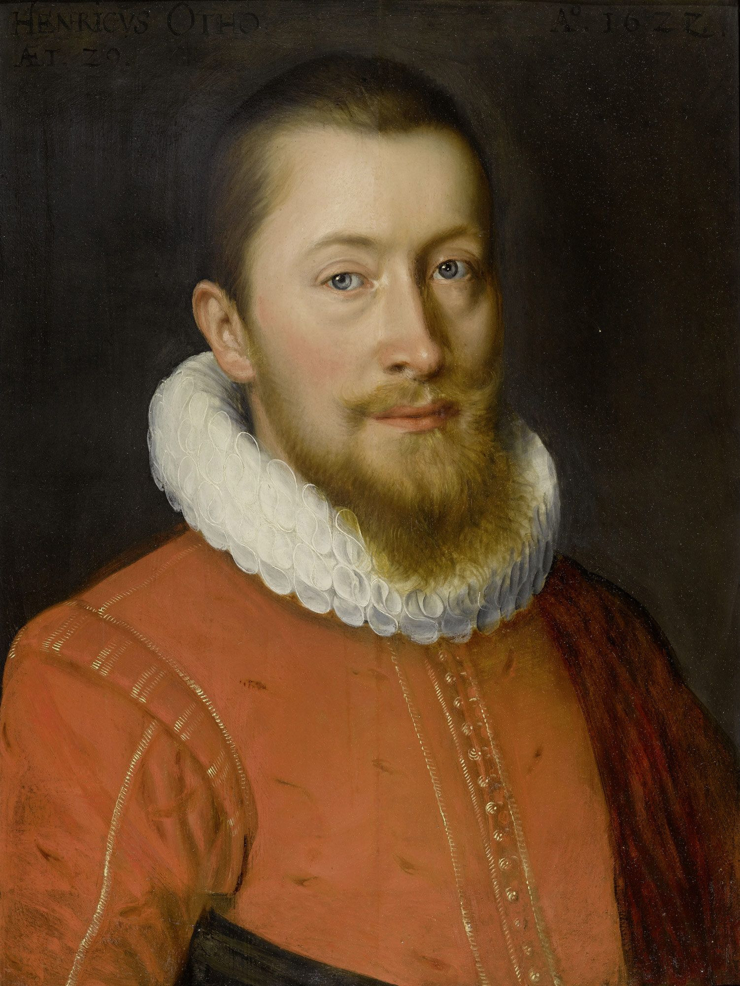 Portrait des Heinrich Otth d. J., seit 1617 Bürger zu Bern.